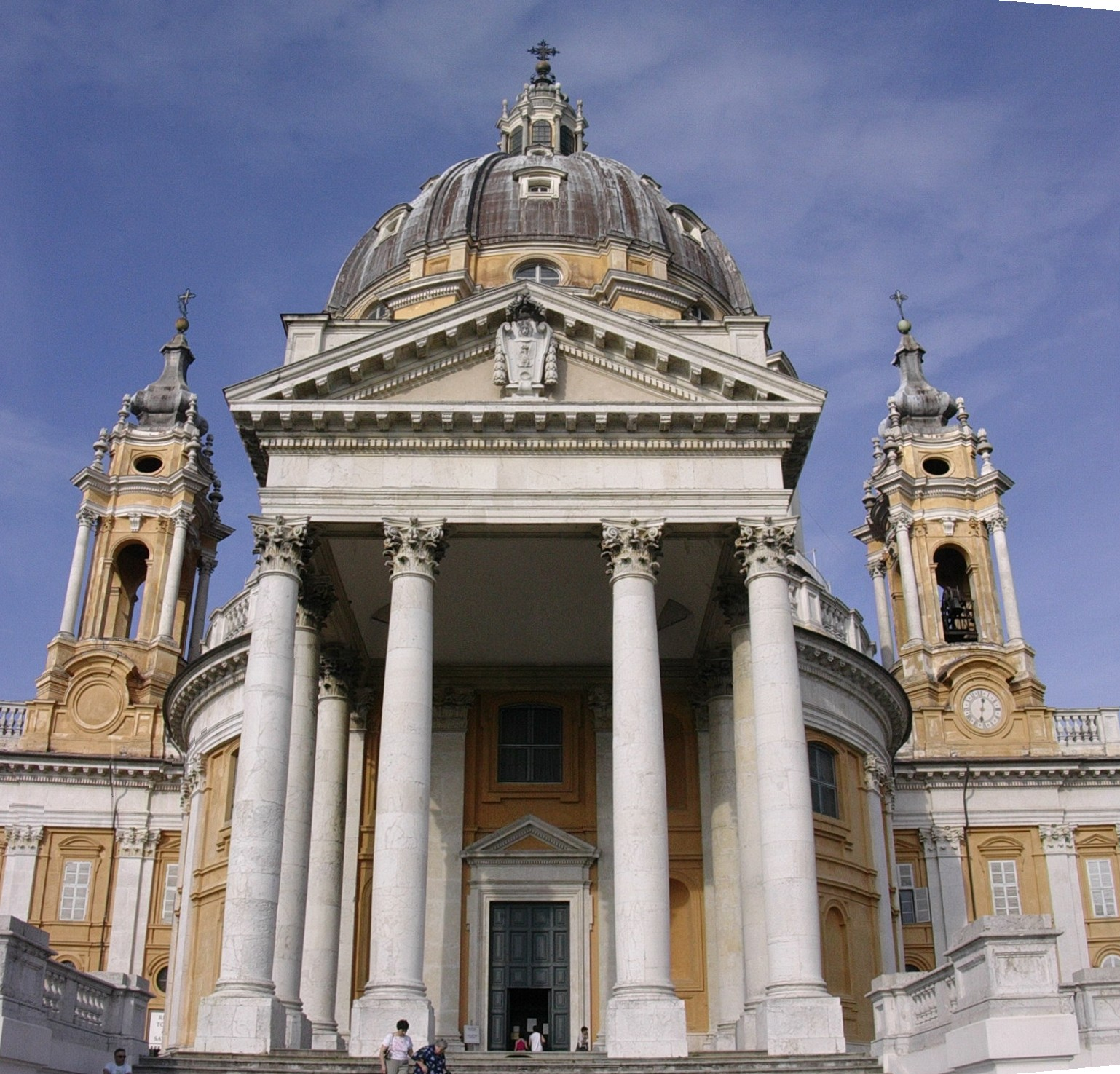 Foto della facciata della basilica di Superga